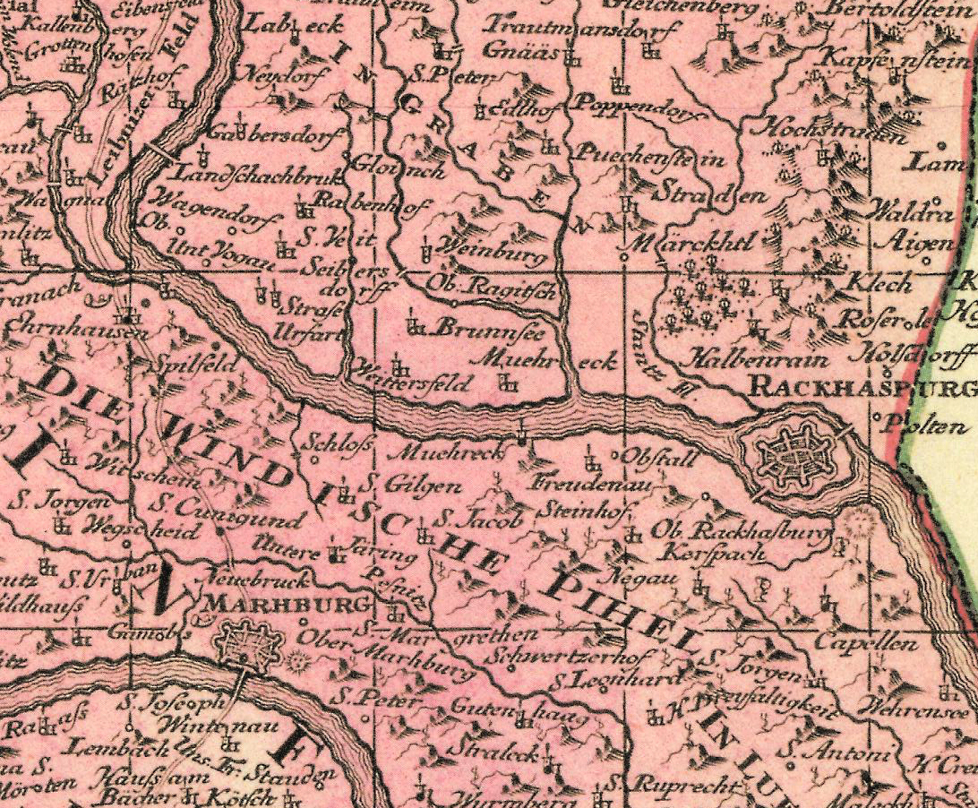 historische Landkarte